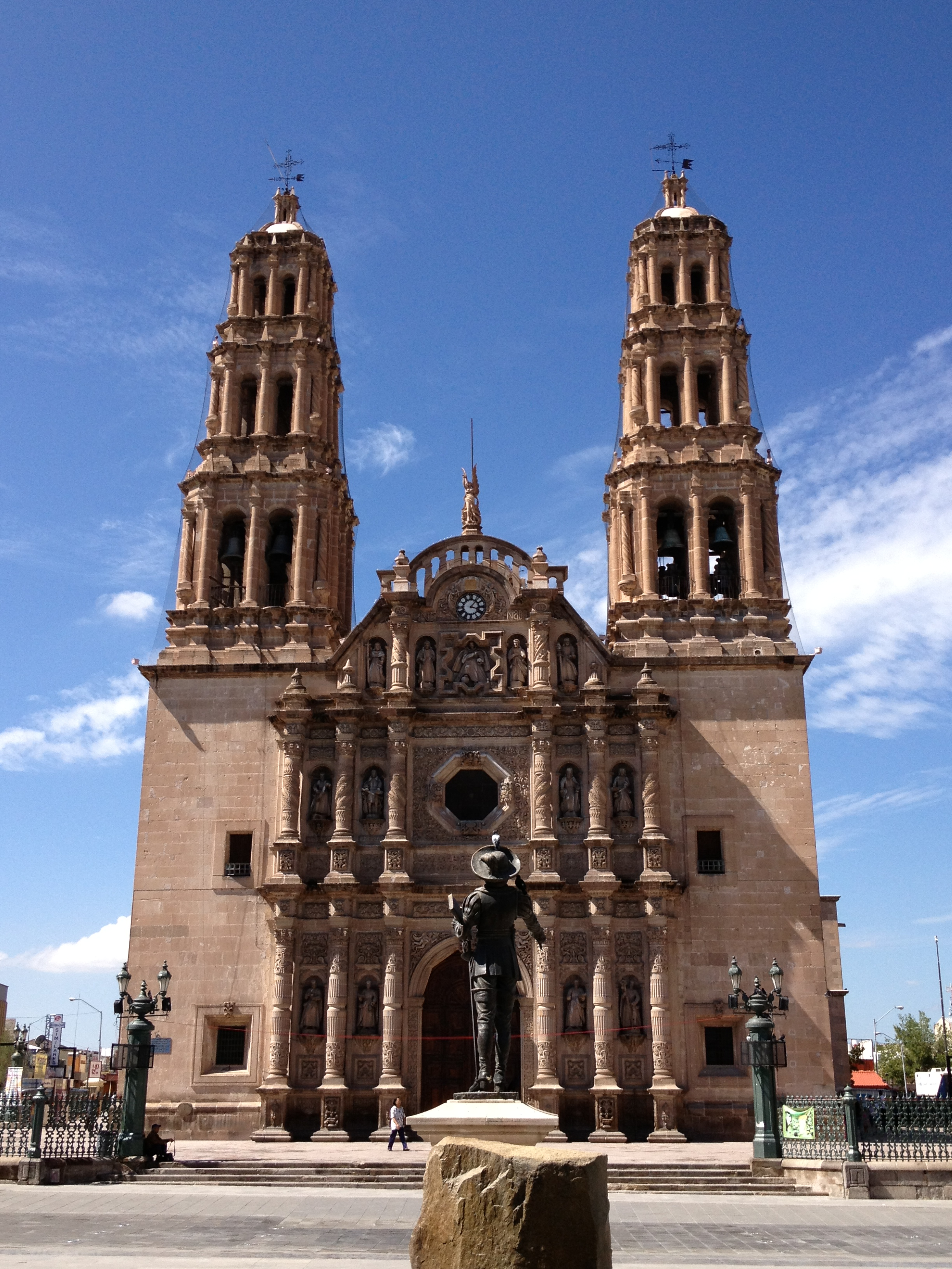 Facha de la Catedral de Chihuahua, en primer plano la estatua del fundador de la ciudad, Antonio de Deza y Ulloa